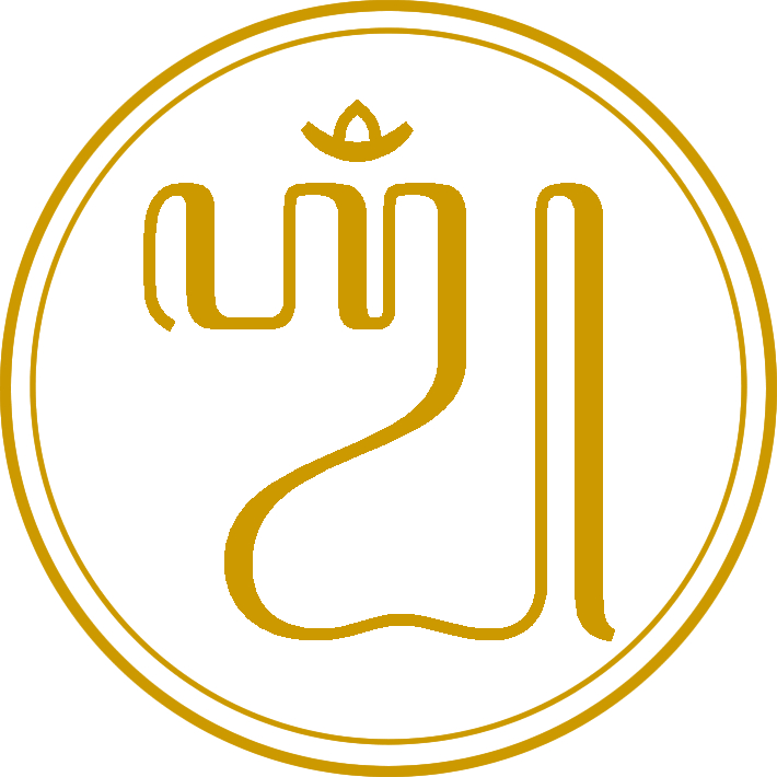 Kaligrafi Aksara Jawa Hyang